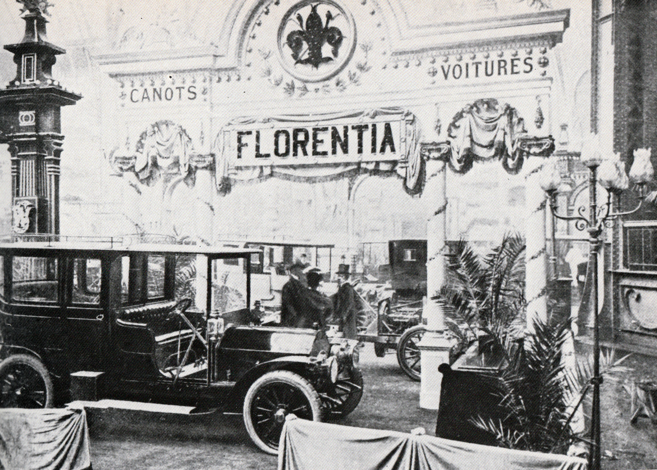 Stand della Florentia al Salone dell'Automobile di Parigi nel 1905